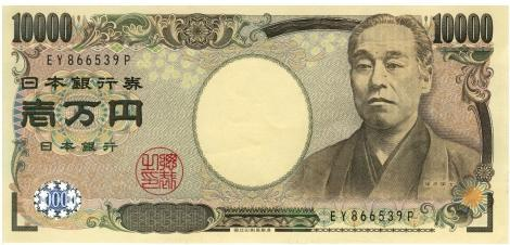 10000_Yen_E_Serie_Vorderseite